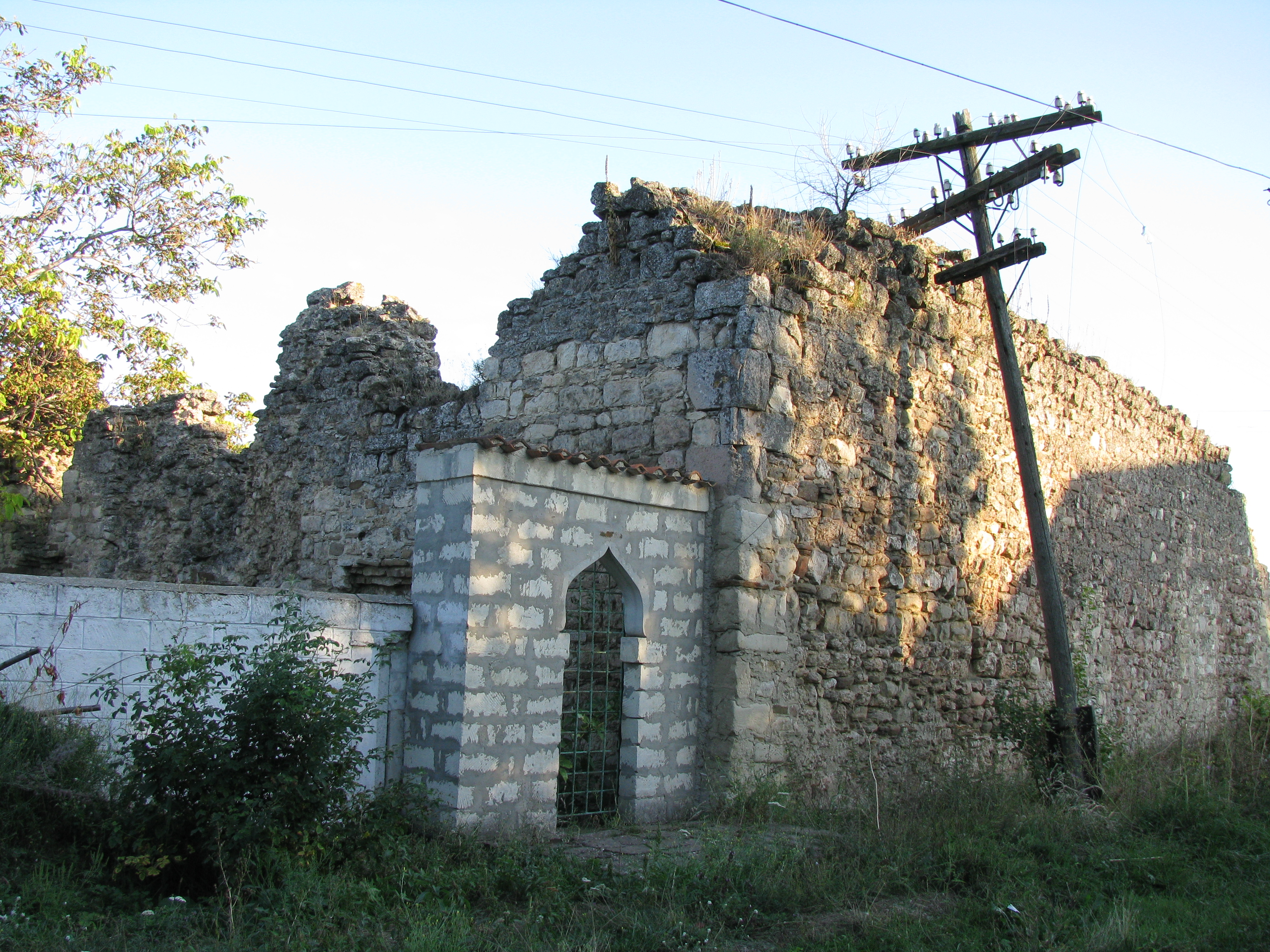 Мечеть Бейбарса (руїни)